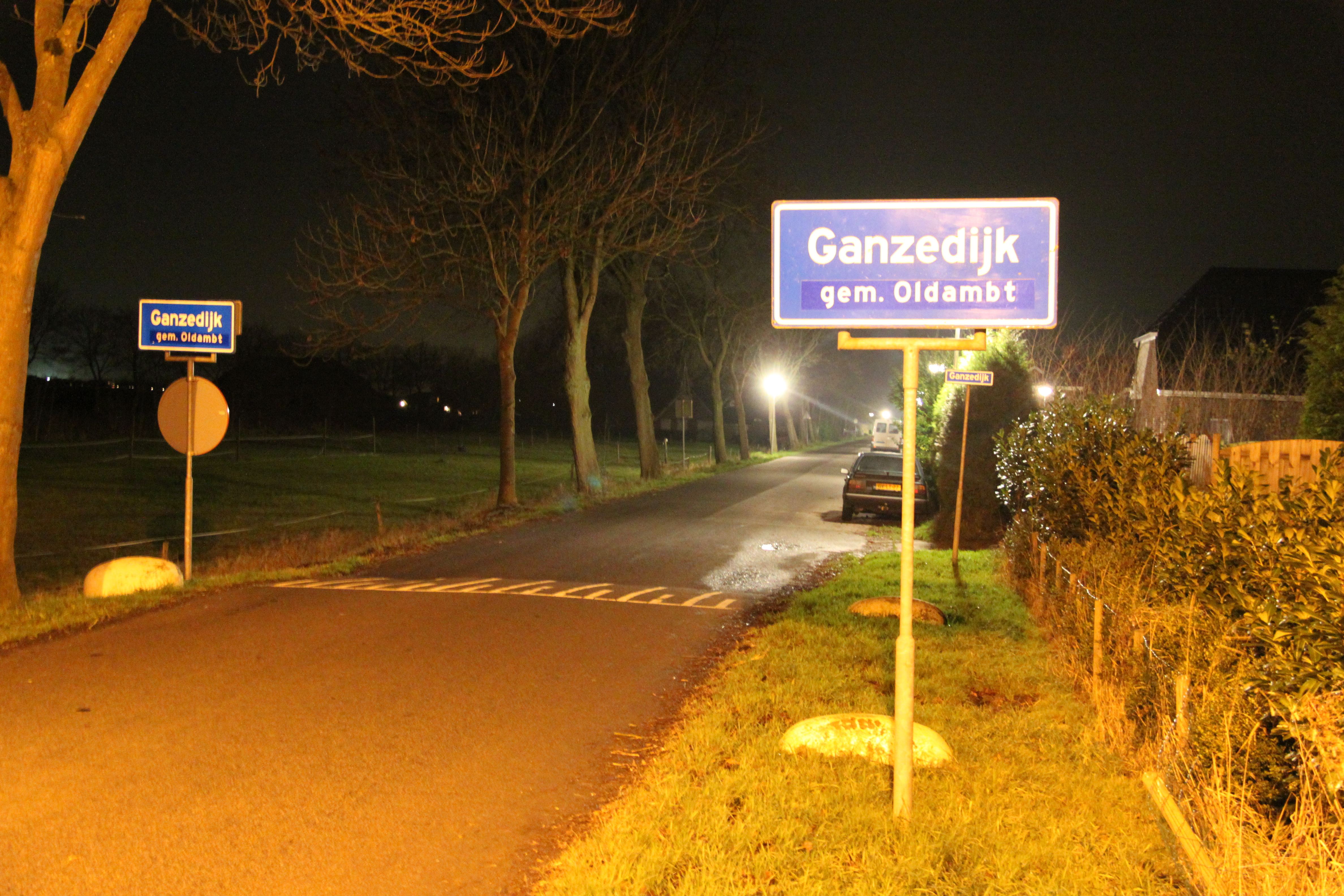 Bebouwde kombord van Ganzedijk, Oldambt, Groningen.